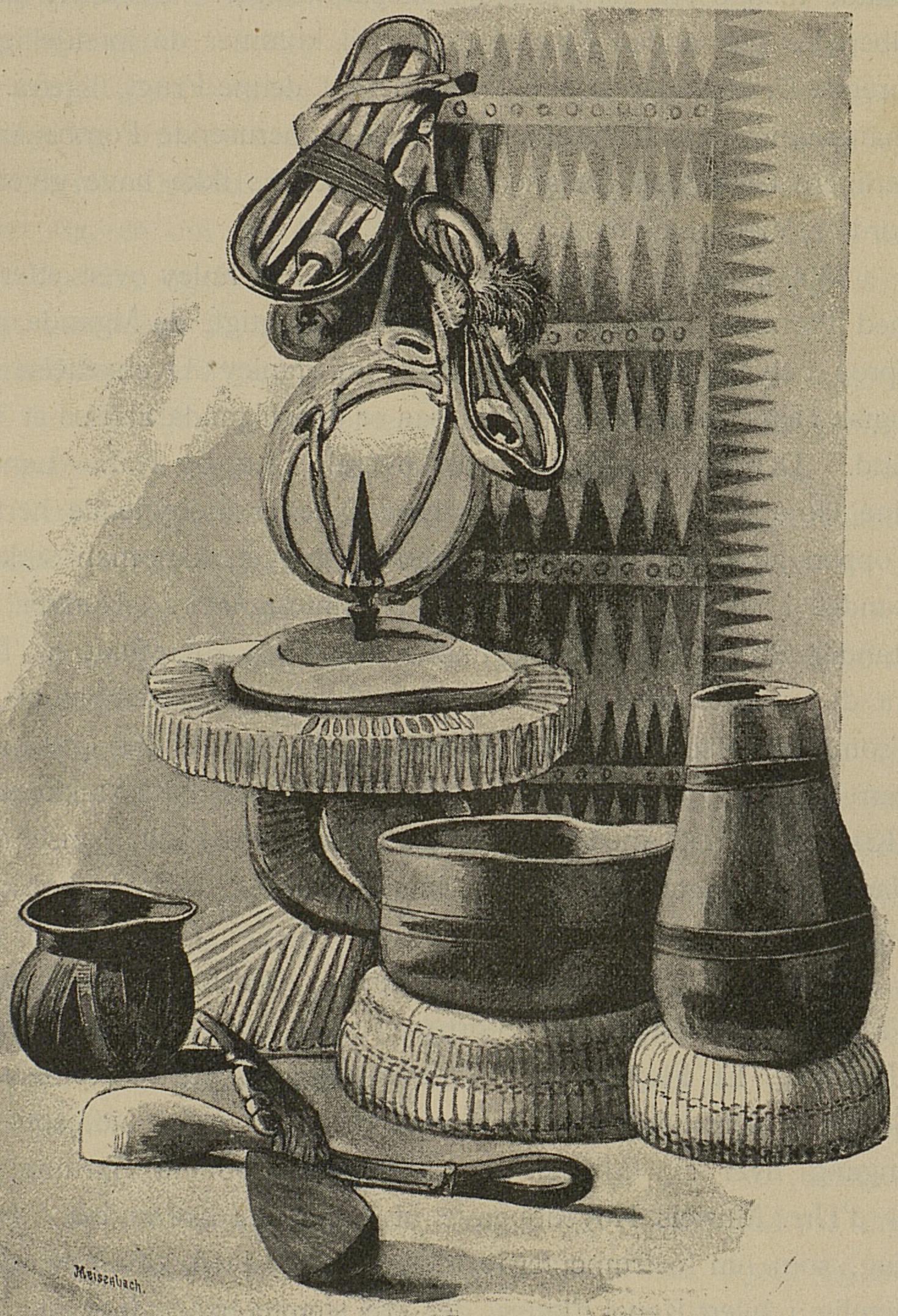 Illustrasjon hentet fra boken "Den tyske Emin Pascha-Expedition" av Peters, Carl og utgitt av Forlagsbureauet (Kjøbenhavn, 1891)